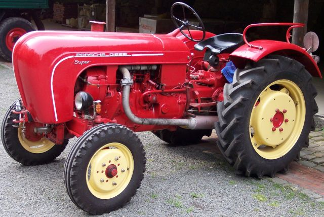 Porsche-Diesel-Traktor Super, Zeche Nachtigall, Witten, Deutschland